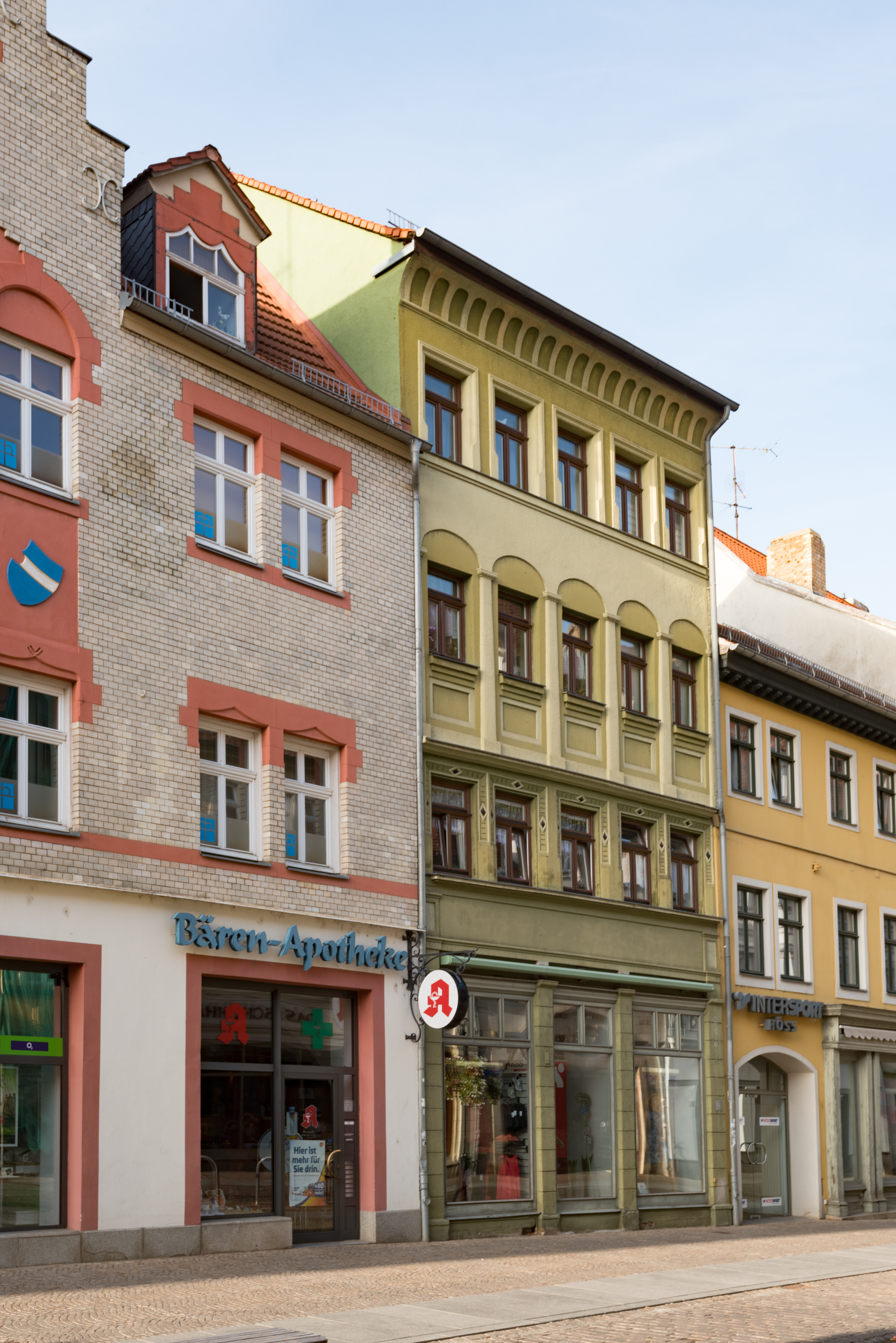 Naumburg (Saale), Jakobstraße 36